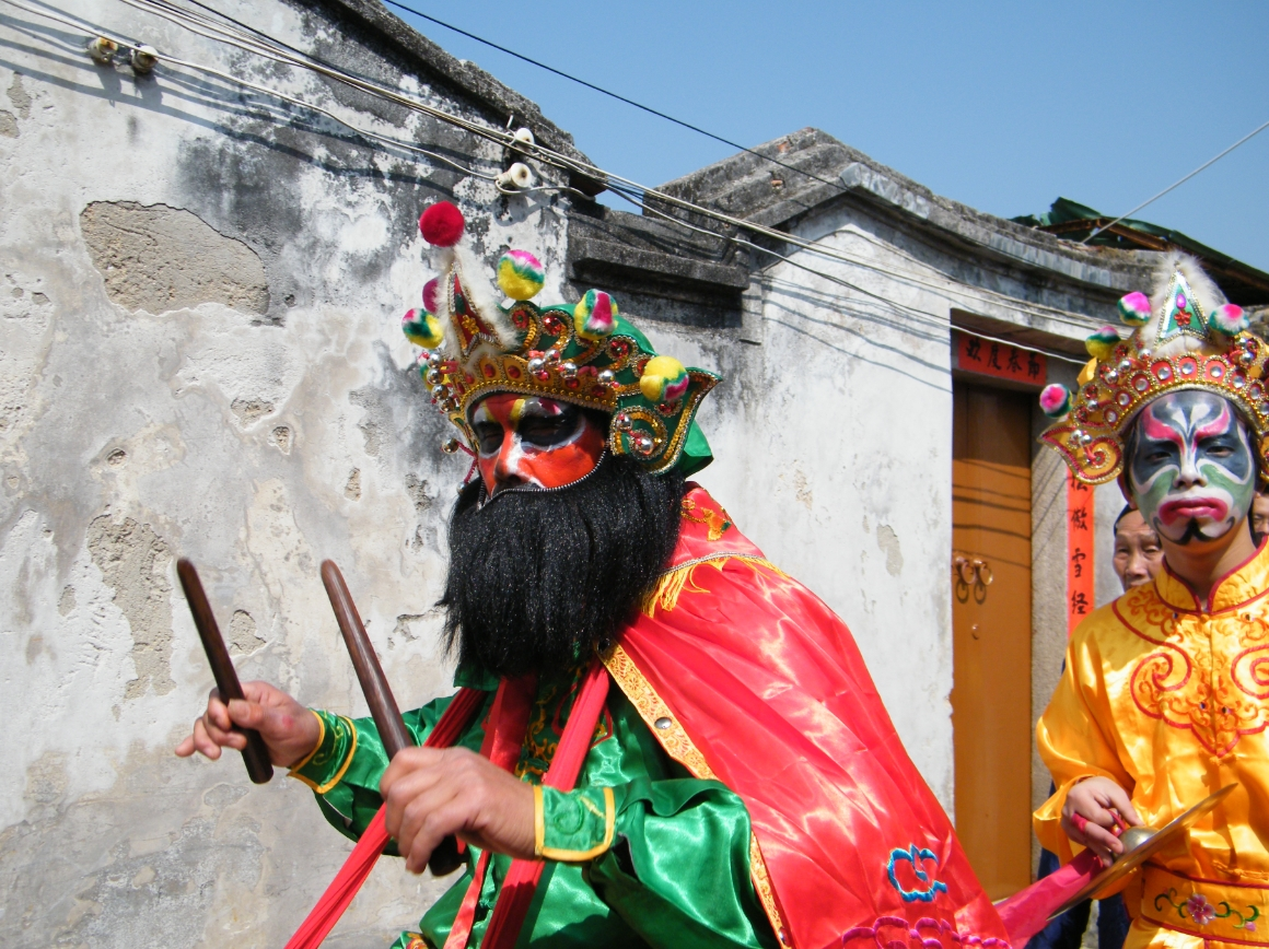 2011年正月初一 达濠 达埠春节巡游 扣英歌